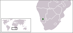 Description:Carte de localisation du bantoustan du Namaland, Namibie Auteur:Rémih